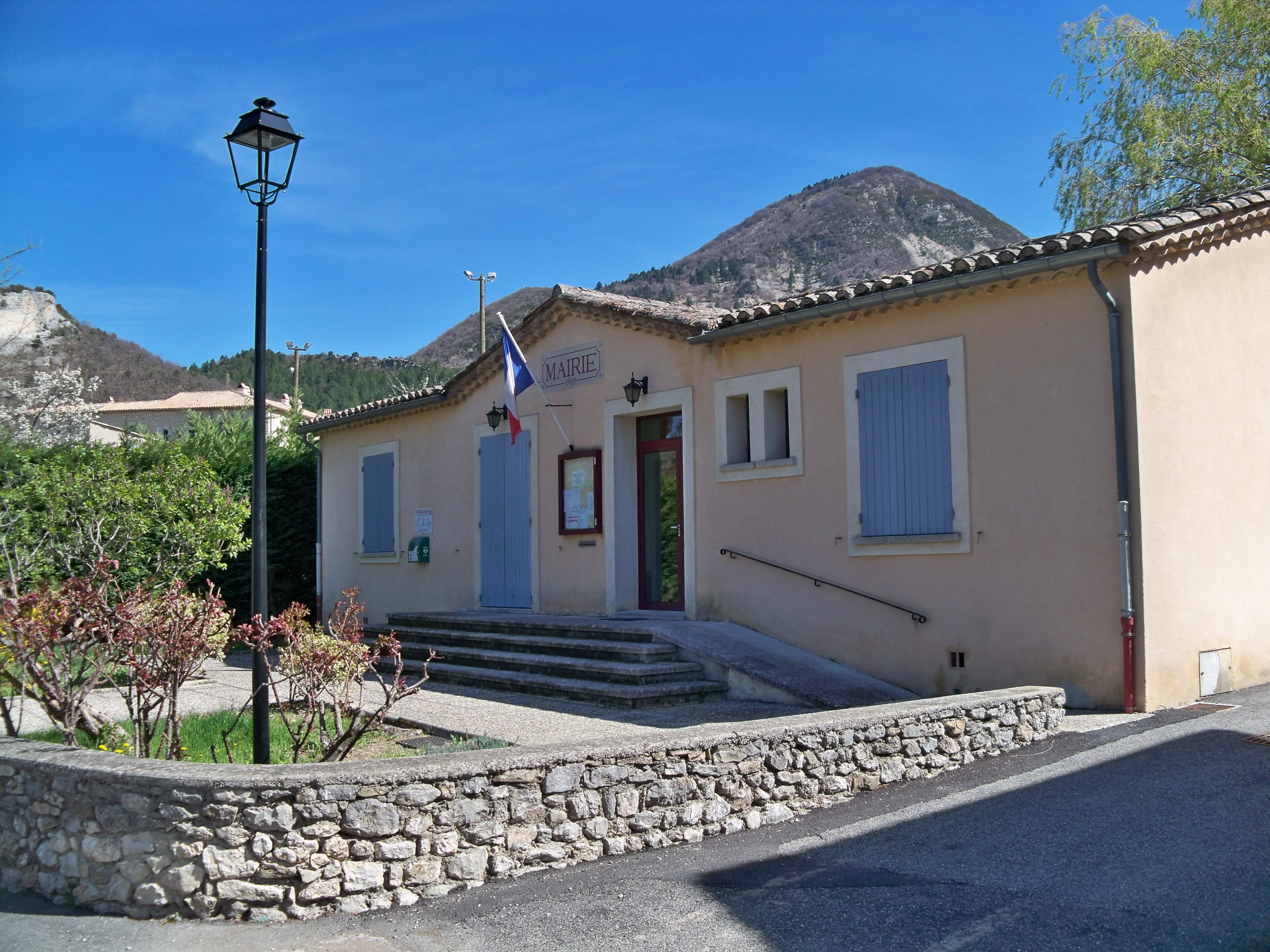 Mairie de Savoillan (84)